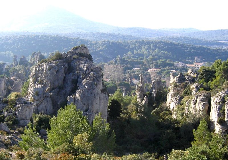 Description: Paysage dolomitique, le Cirque de Mourèze. Hérault, France. Source: Hugo Soria Licence: GFDL Hugo Soria